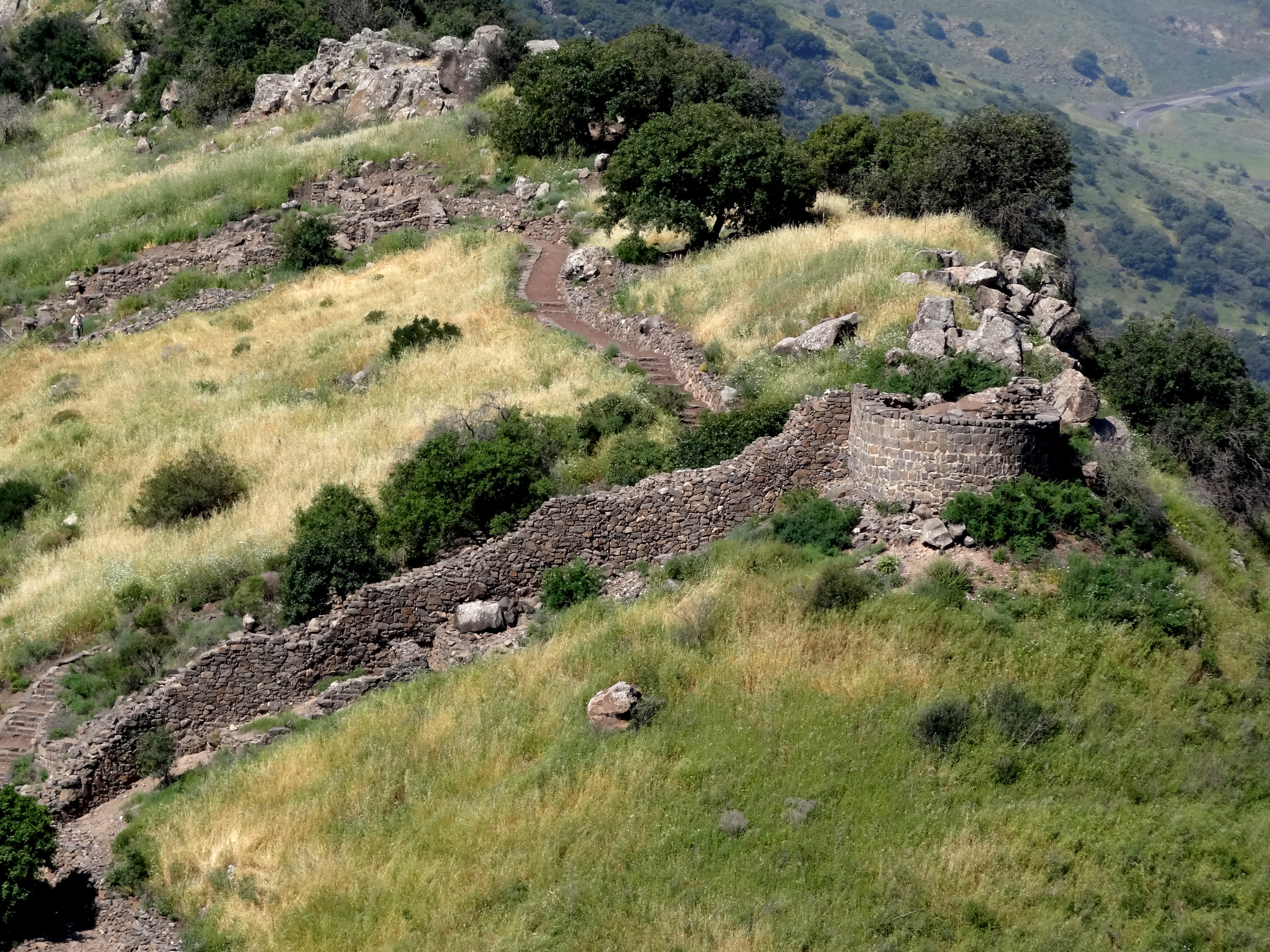 Gamla archaeology site אתר ארכאולוגי גמלא ברמת הגולן המגדל העגול ושרידי החומה